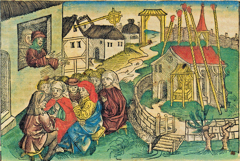 Hans Böheim káže lidu. Vyobrazení ve Schedelschen Chronik z roku 1493. Böheim veřejně vystupoval proti desátkům, úplatkům a daním. Würzburský biskup Rudolf II. von Scherenberg nechal Böheima za jeho názory upálit.